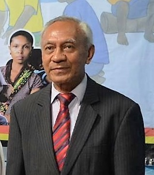 Domingos Francisco de Sousa, Botschafter Osttimors in Brasilien